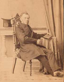 Adolf Theodor Hermann Fritzsche (1818-1878), Theologe